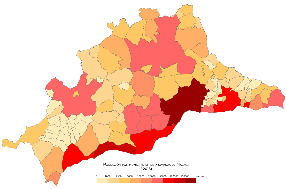 Población por municipio en la provincia de Málaga en el año 2018